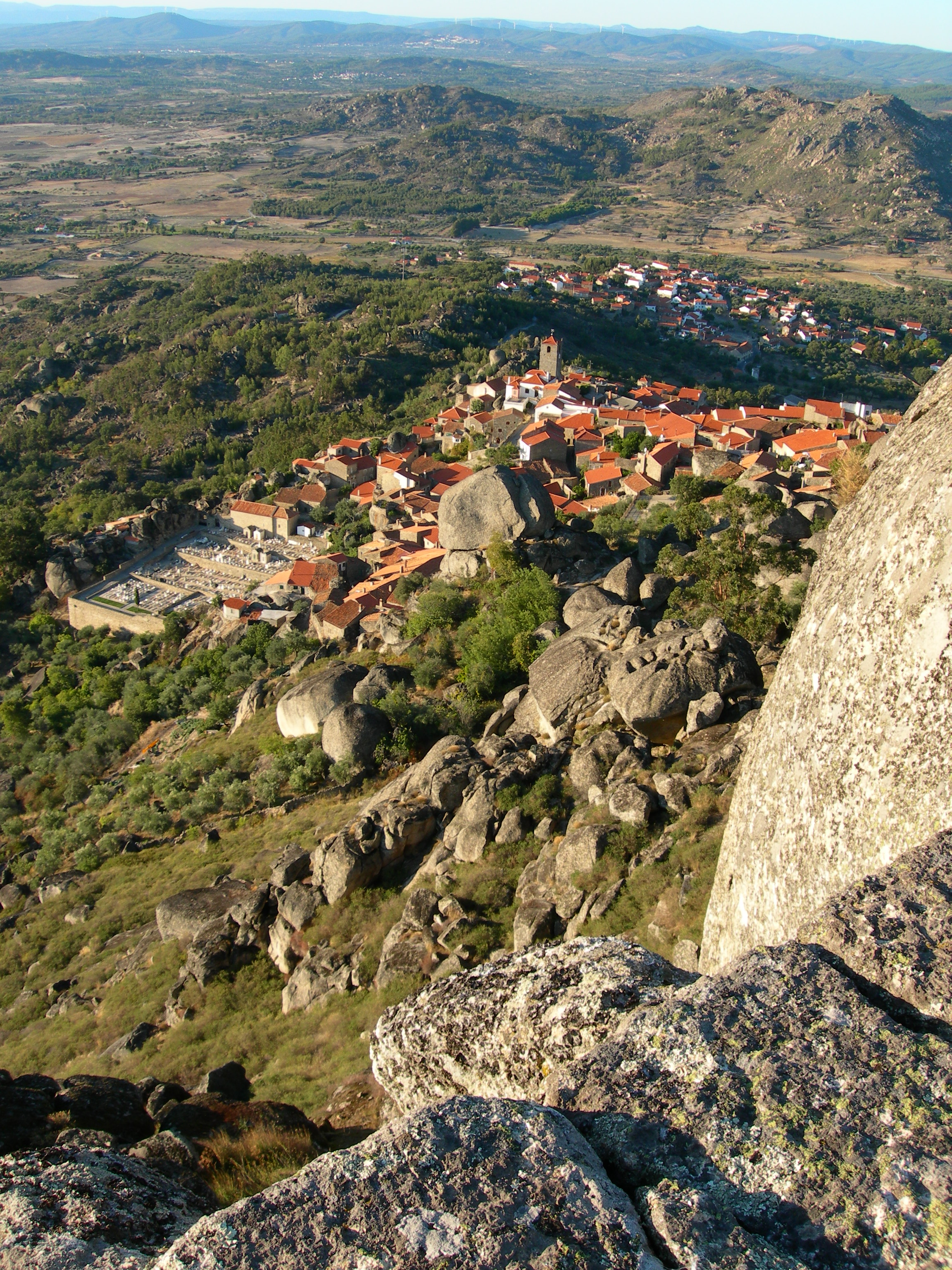 Aldeia Velha de Monsanto VI This monument is classified as Imóvel de Interesse Público. This file was uploaded for Wiki Loves Monuments in Portugal with the unique identifier 74233.